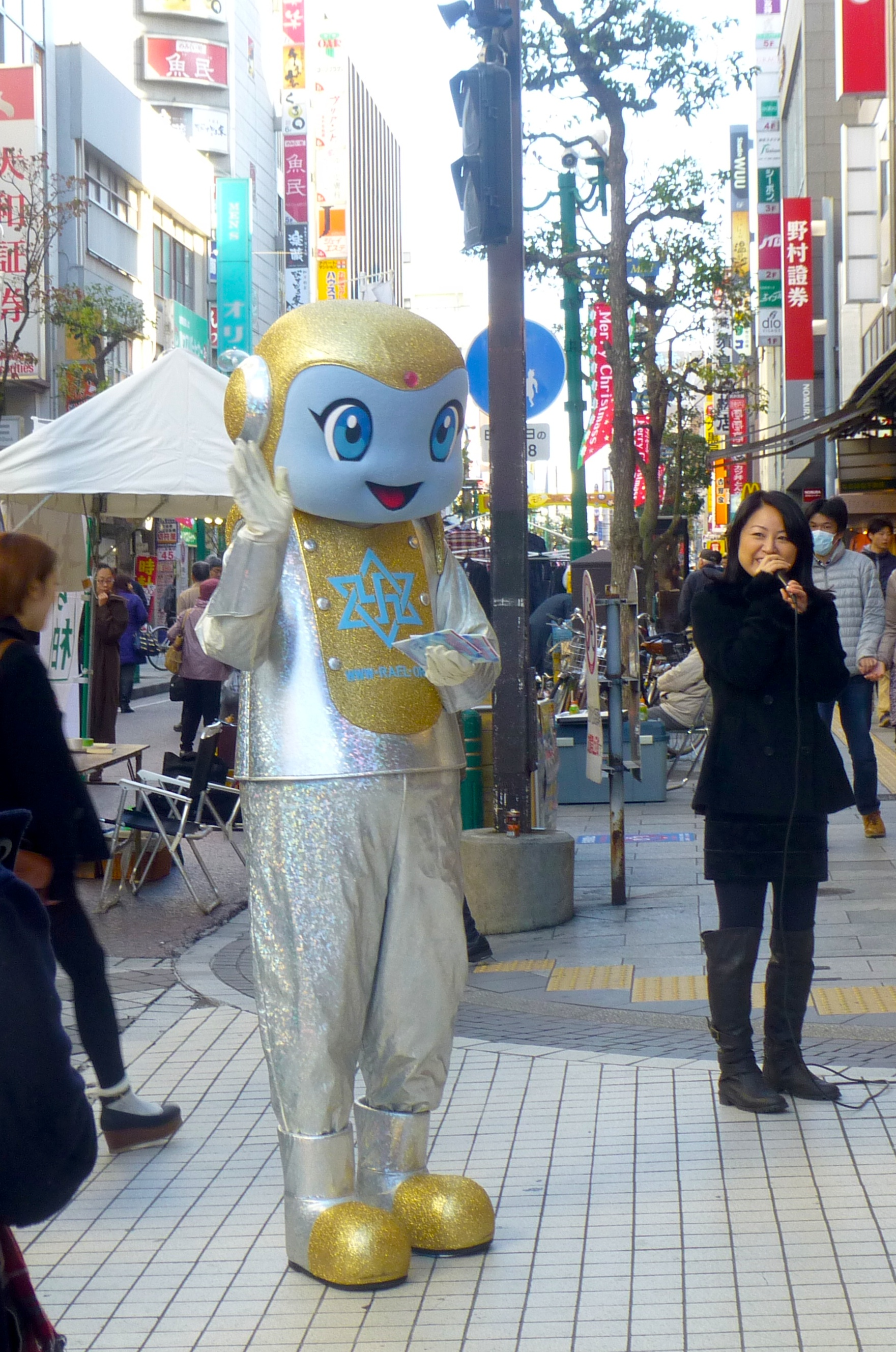 Raëlians in Japan. 日本のラエリアン